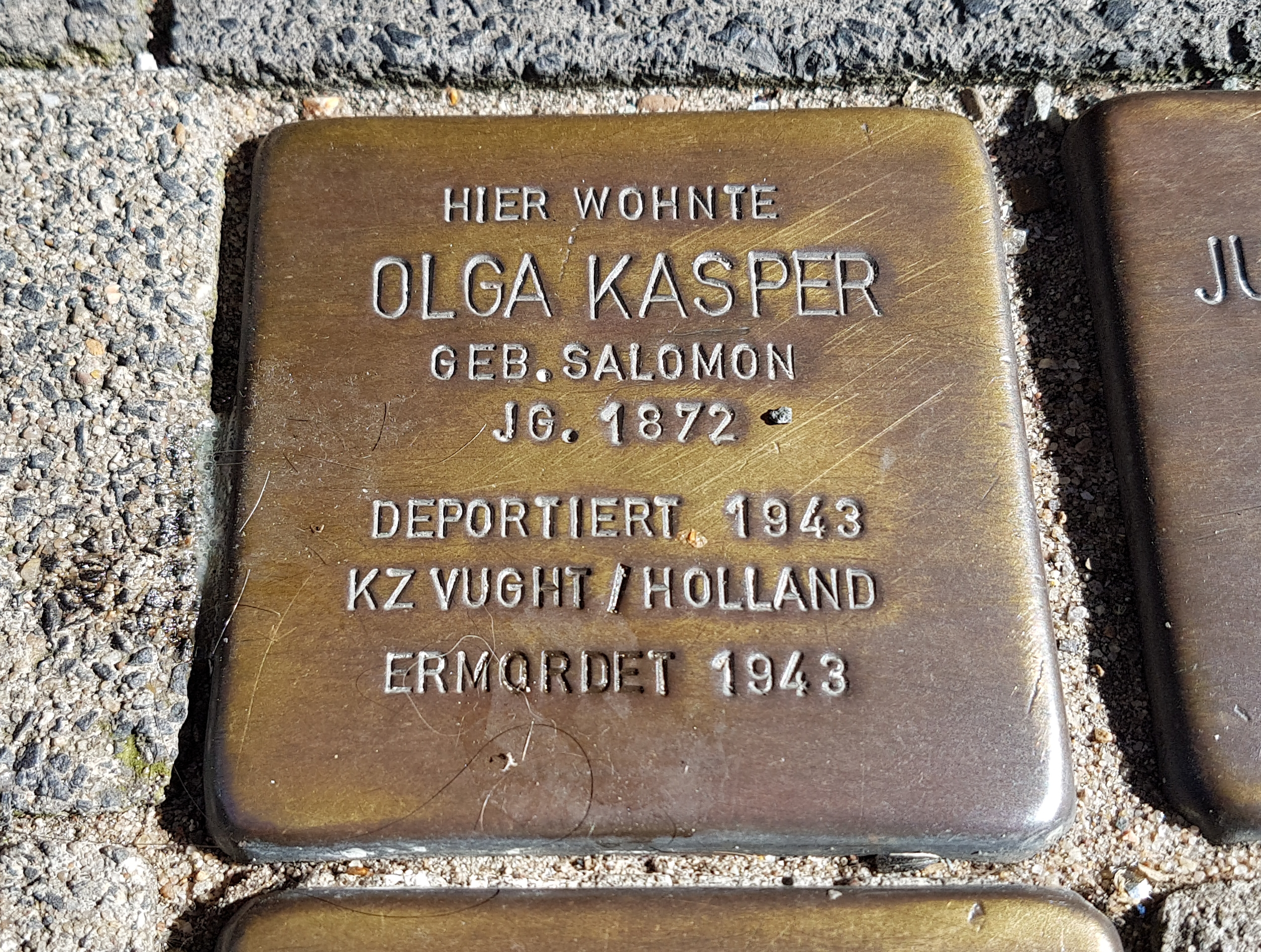 Stolperstein Duisburg Olga Kasper